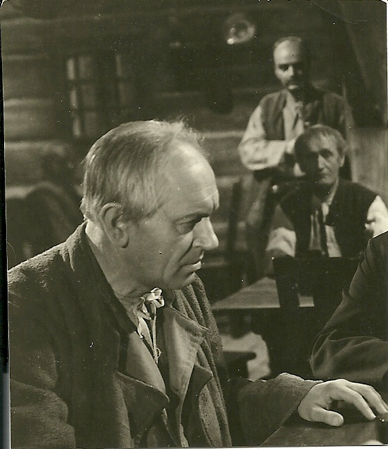 Jaroslav Průcha, člen činohry Národního divadla